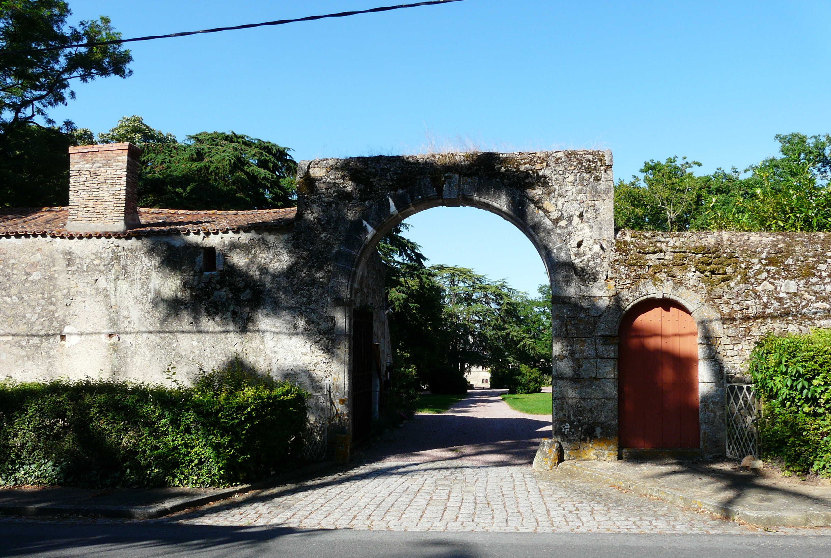 Le portail d'entrée du château de Maisontiers, Deux-Sèvres, France